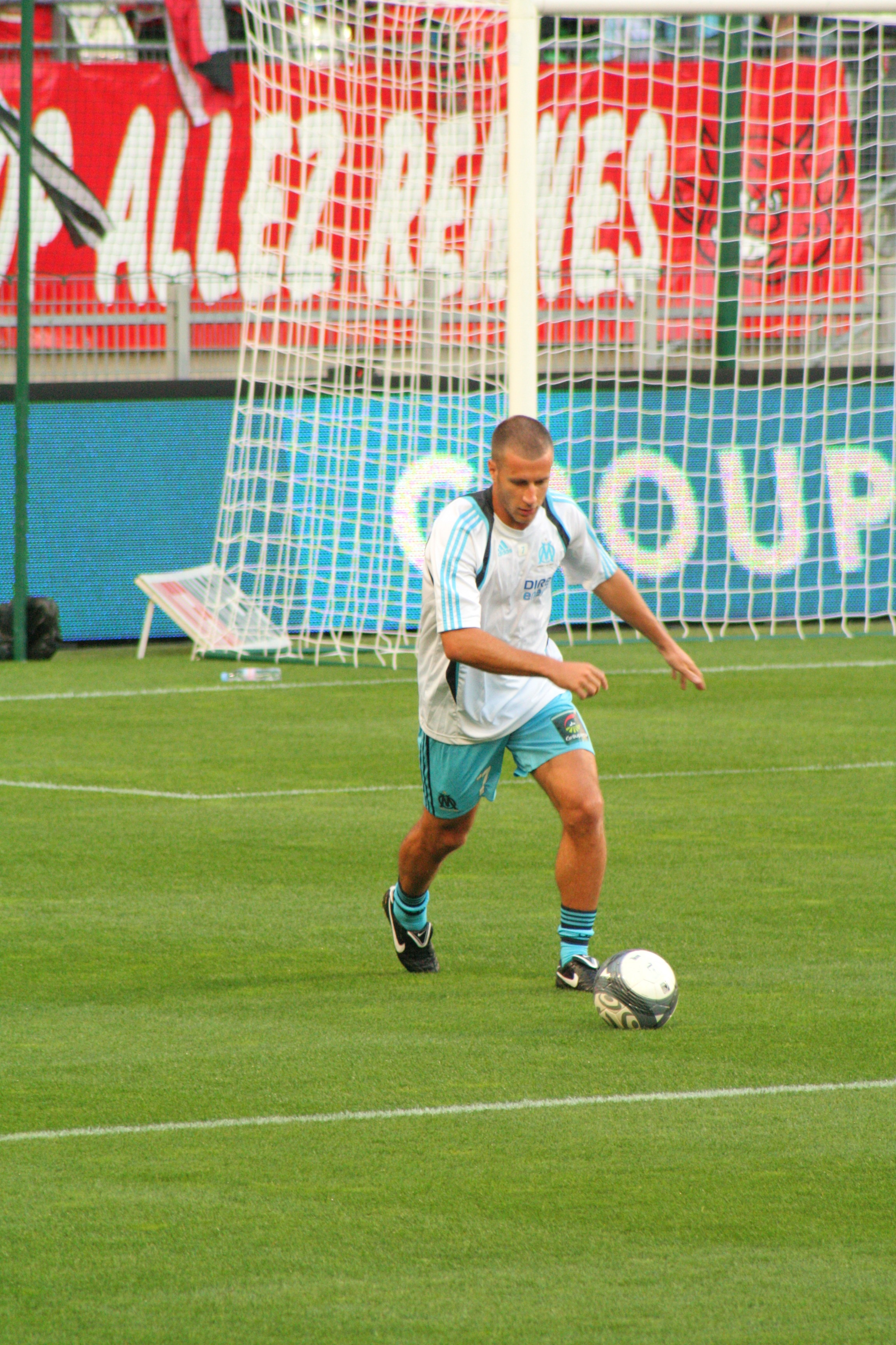 benoit cheyrou sous les couleurs de l'om à l'echauffement le 22/08/09 juste avant le match contre rennes